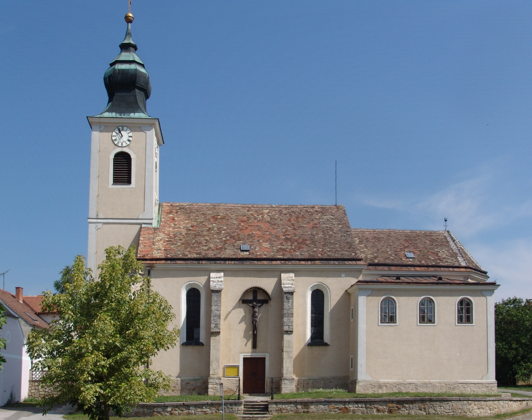 Pfarrkirche hl. Leopold in Niederschleinz, Sitzendorf an der Schmida Object location48° 35′ 41.17″ N, 15° 53′ 28.97″ E